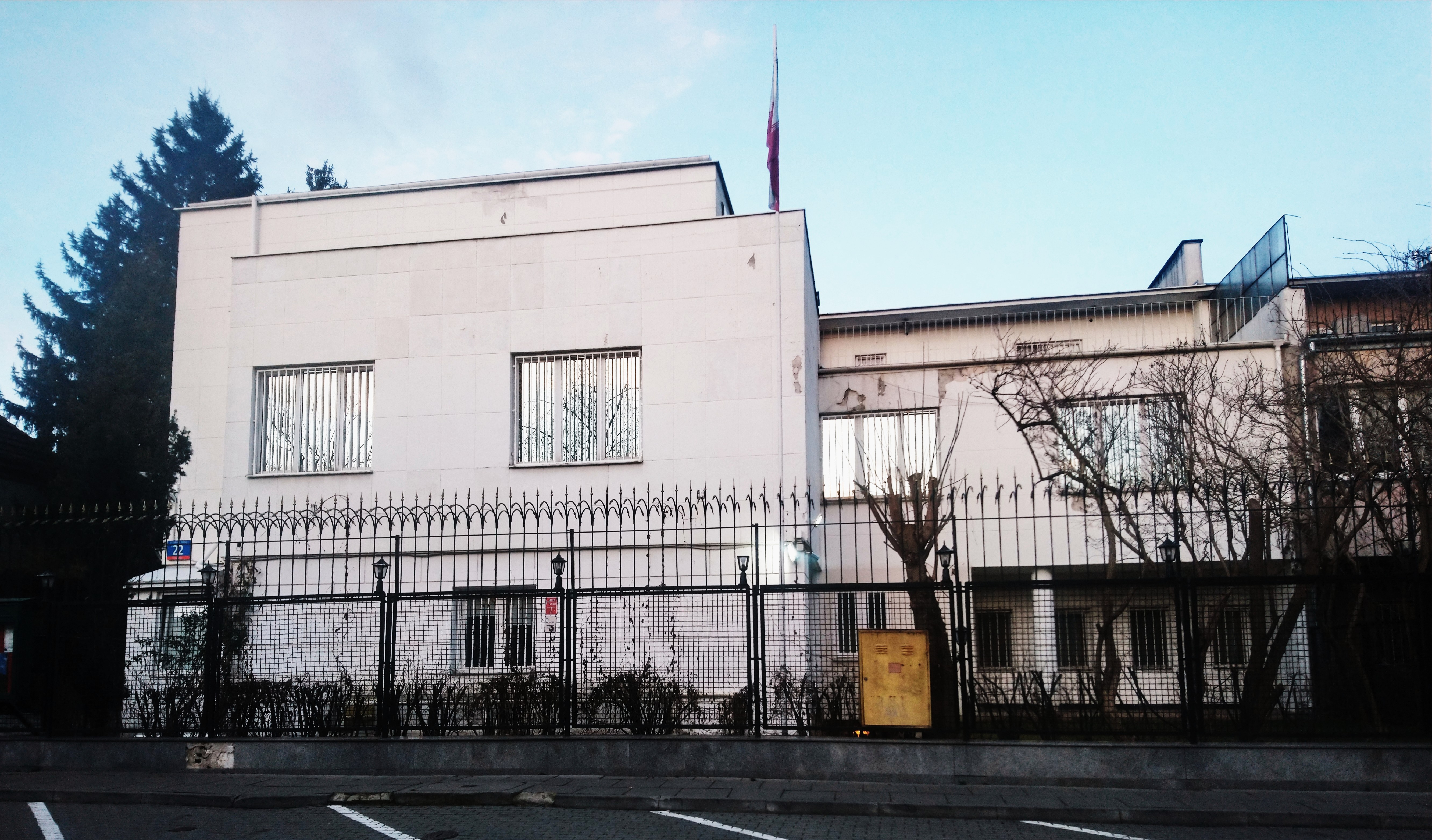 Ambasada Iranu